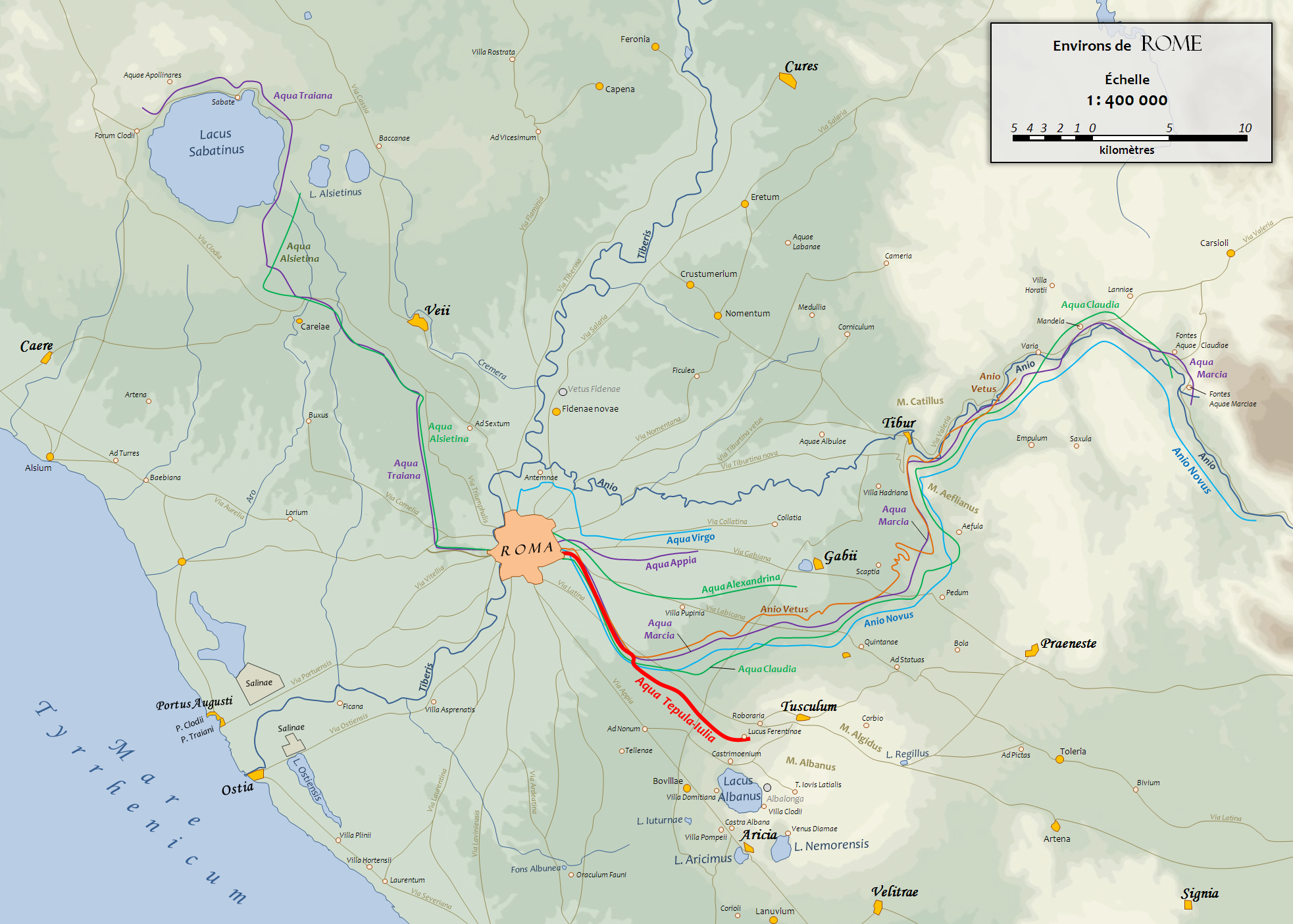 Carte du Latium antique sur lequel figure le tracé des aqueducs de Rome. D'après un fond de carte de 1886 (G. Droysens Allgemeiner Historischer Handatlas).